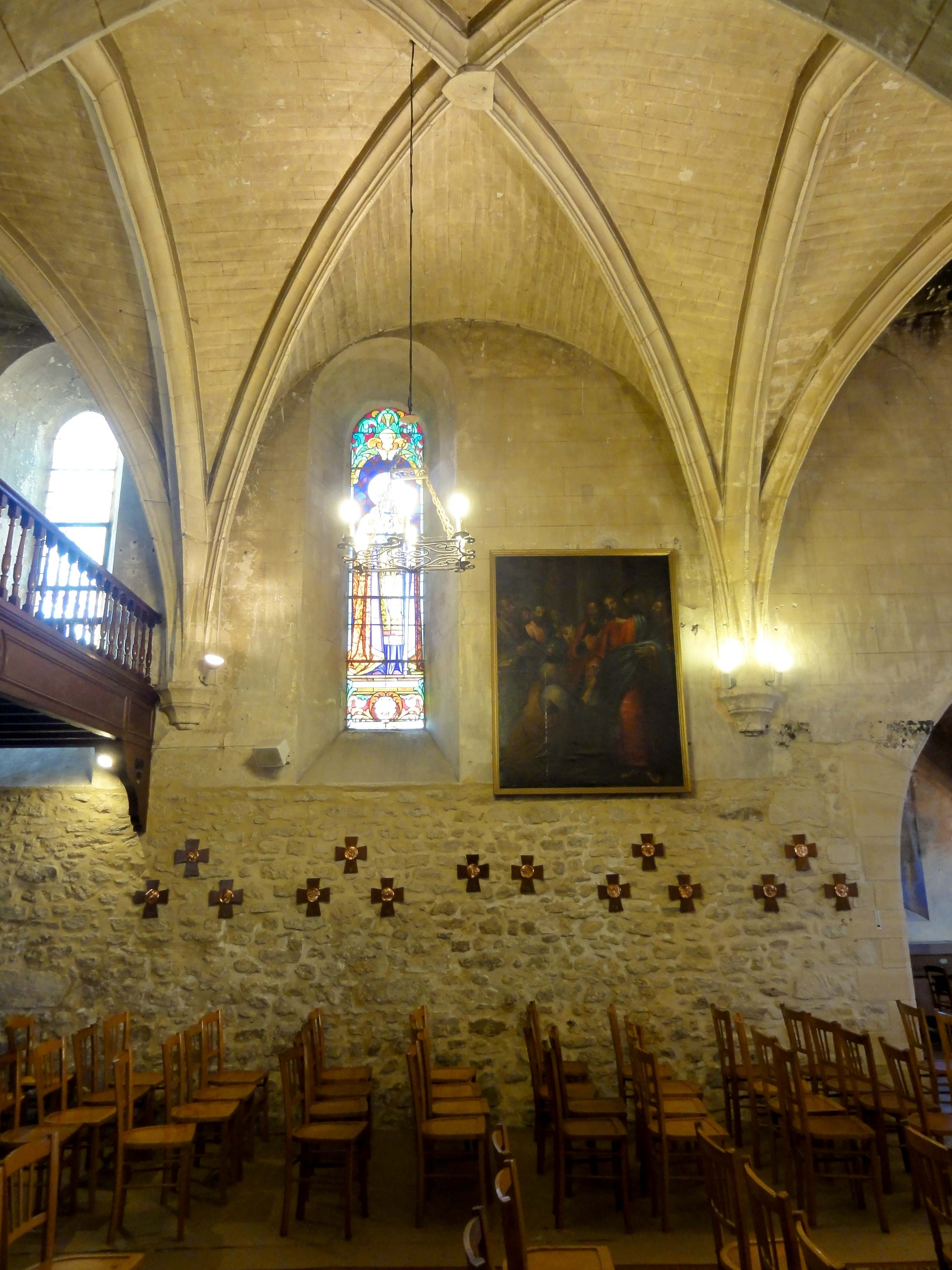 Nef, 2e travée, élévation nord.